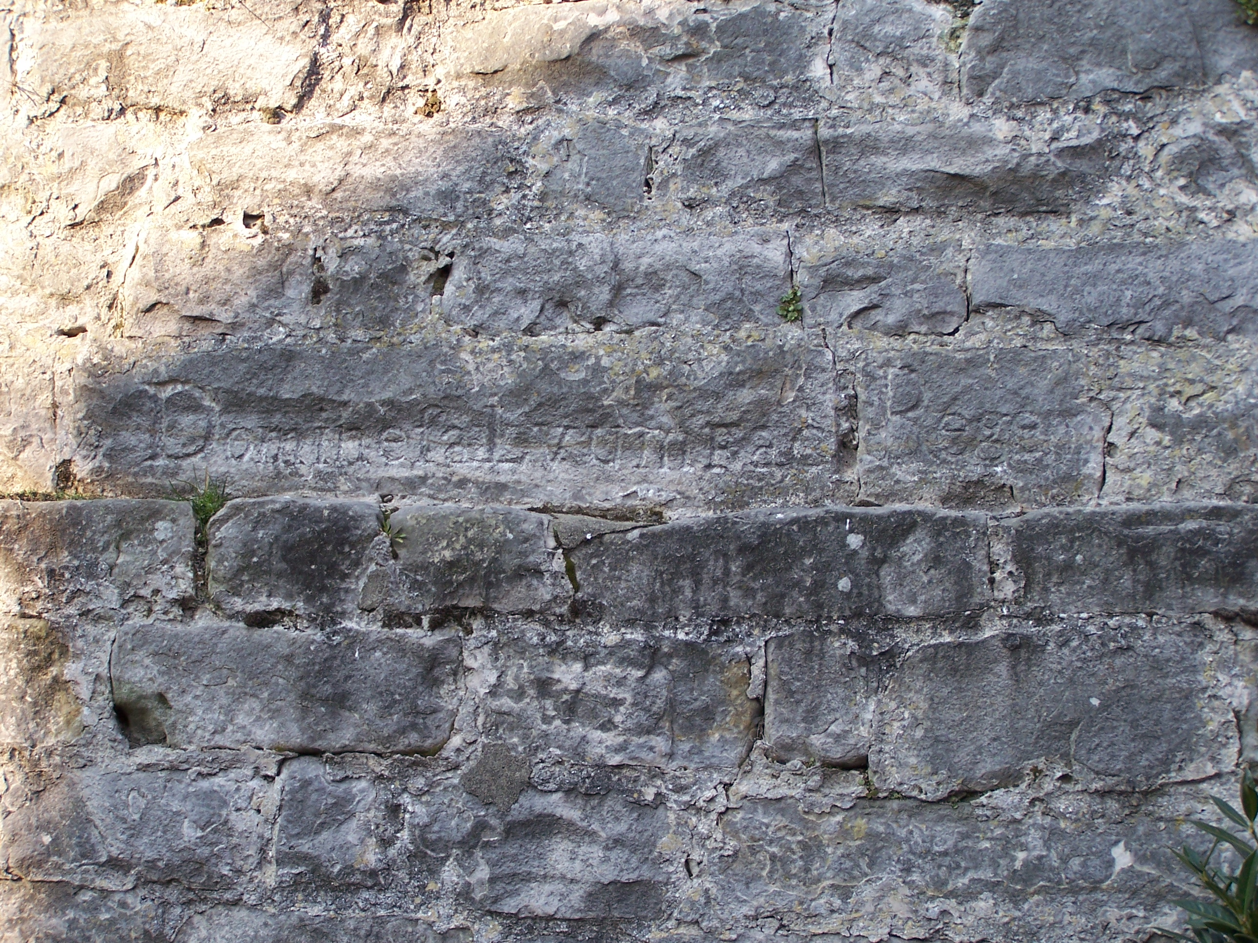 Domine, salvum fac regem Eglise Acy en Multien